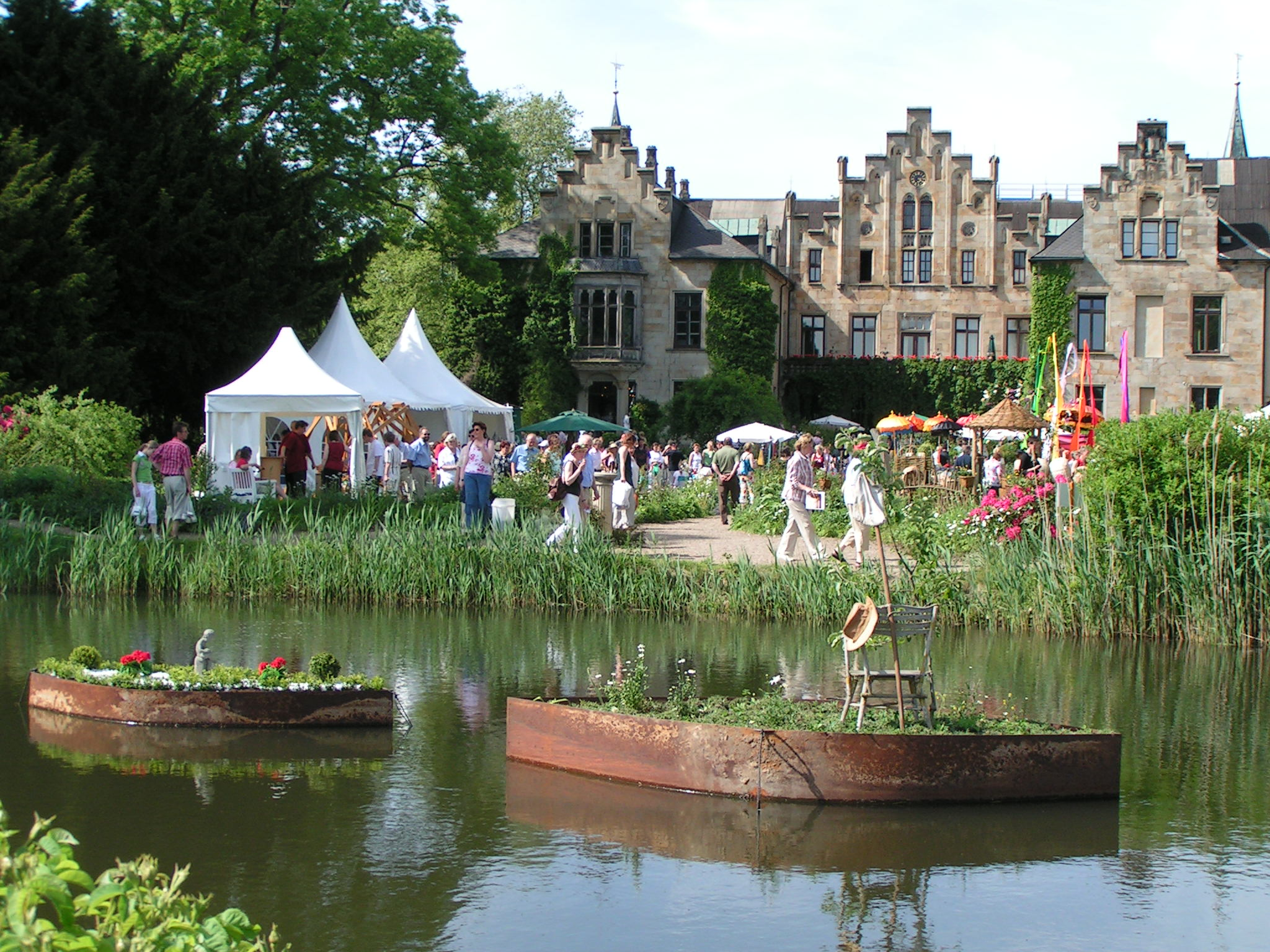 Gartenlust & Landvergnügen 2005 im Park von Schloss Ippenburg